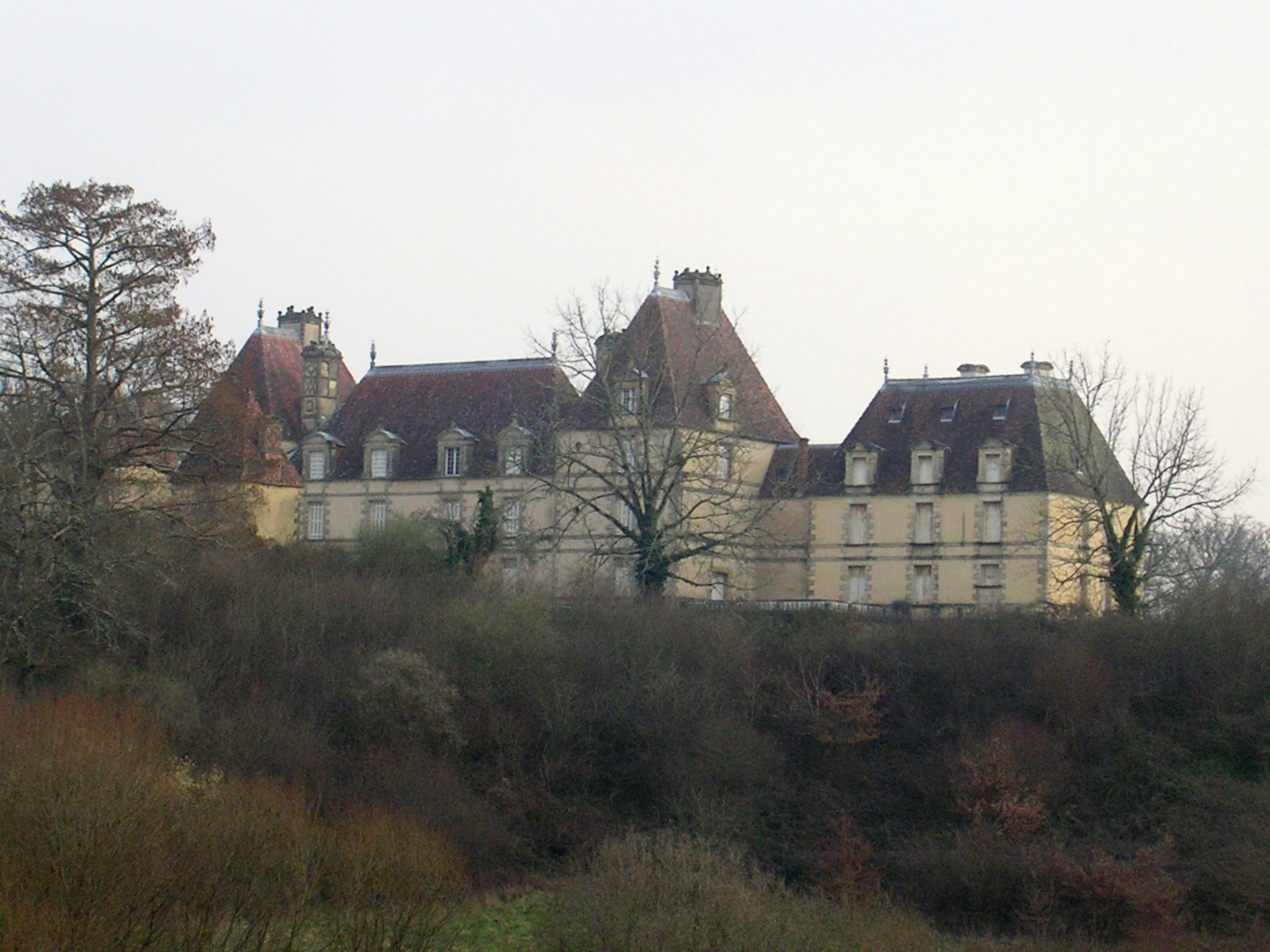 Château de Castillon, à Arengosse, dans le département français des Landes